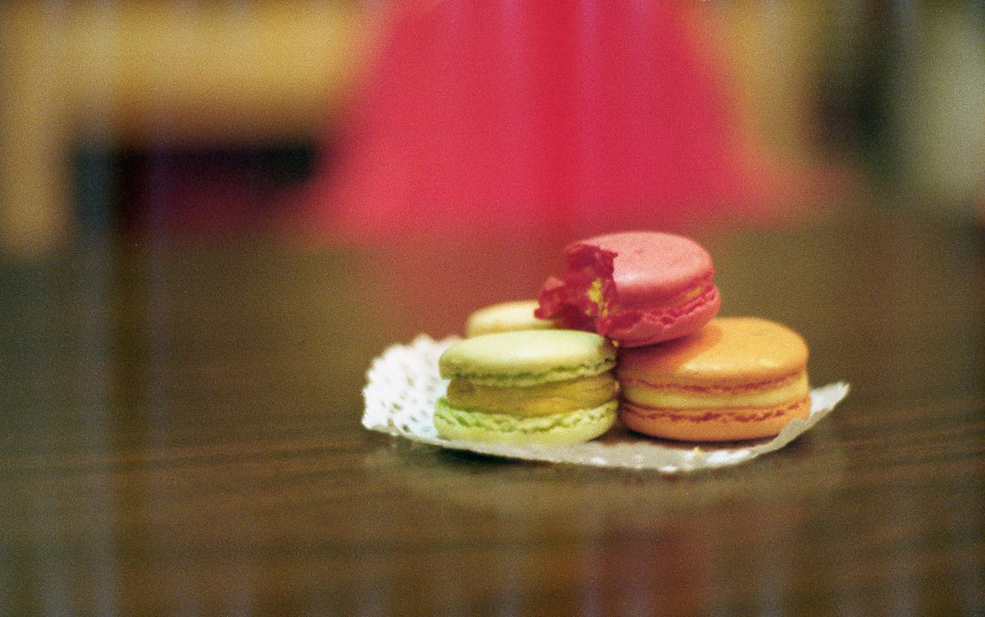 la maison du macaron